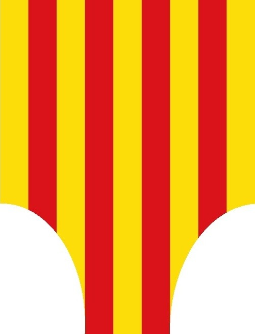 Bandera Abocelada